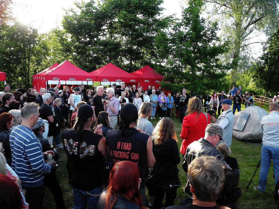 Gunnar Grapsi mälestuskivi avamine Amme jõekäärus muusikafestivali Amme Rock 2017 raames. Mikrofonil Tartu vallavanem Aivar Soop. Kivi asub fotol paremal.